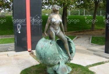 Pormenor do conjunto escultórico «Ara Vitae»